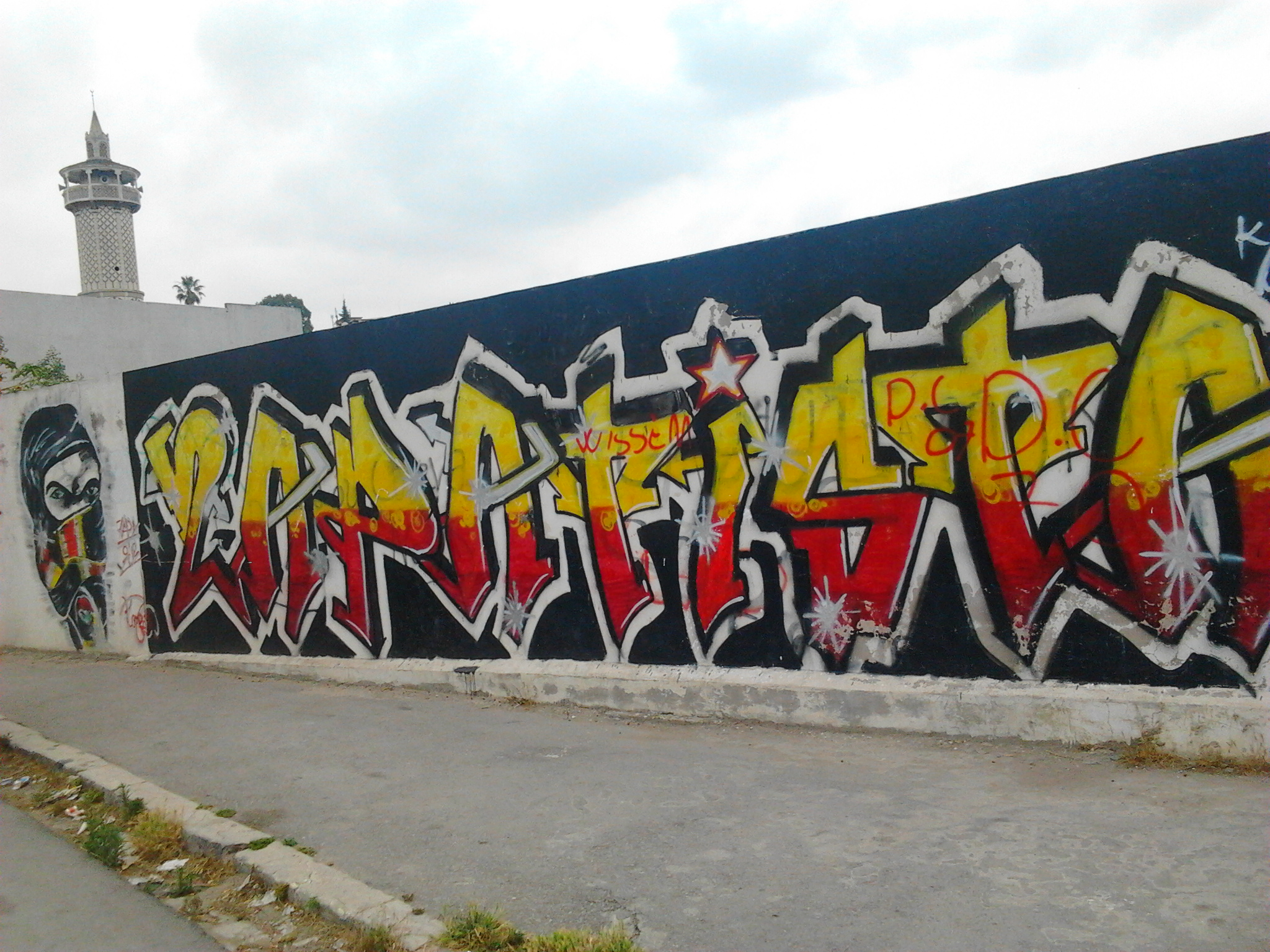 Zapatista: groupe de supporteurs de l’espérance sportive de Tunis